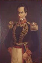 Juan de la Cruz Mourgeón, dernier vice-roi de nouvelle-Grenade (1819-1821)